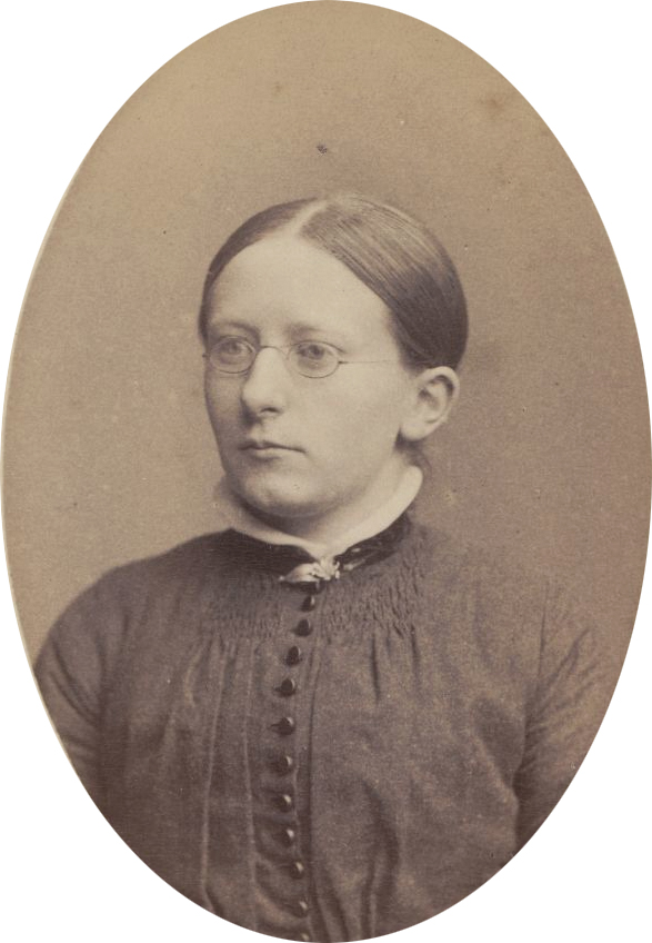 portret van Emilie Charlotte Knappert (1860-1952), directrice Volkshuis Leiden en School voor Maatschappelijk Werk Amsterdam